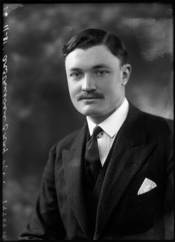 Lord Kilmany